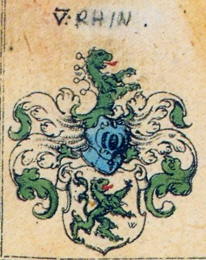 Wappen der Familie Zu Rhein, aus: Johann Siebmacher: New Wappenbuch eingescannt aus: Horst Appuhn (Hrsg.), Johann Siebmachers Wappenbuch. Die bibliophilen Taschenbücher 538, 2. verb. Aufl , Dortmund 1989 Schweizer Blatt 197